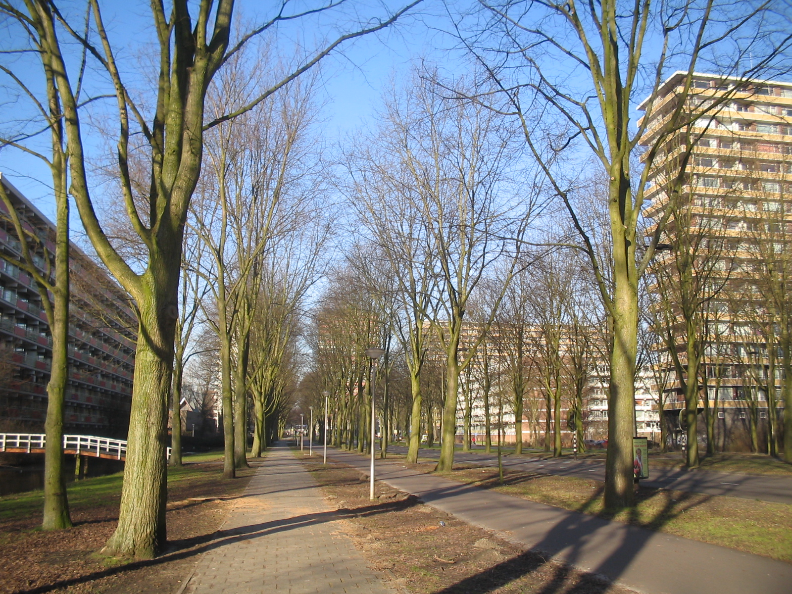 impressie Voorhof, Delft, januari 2006